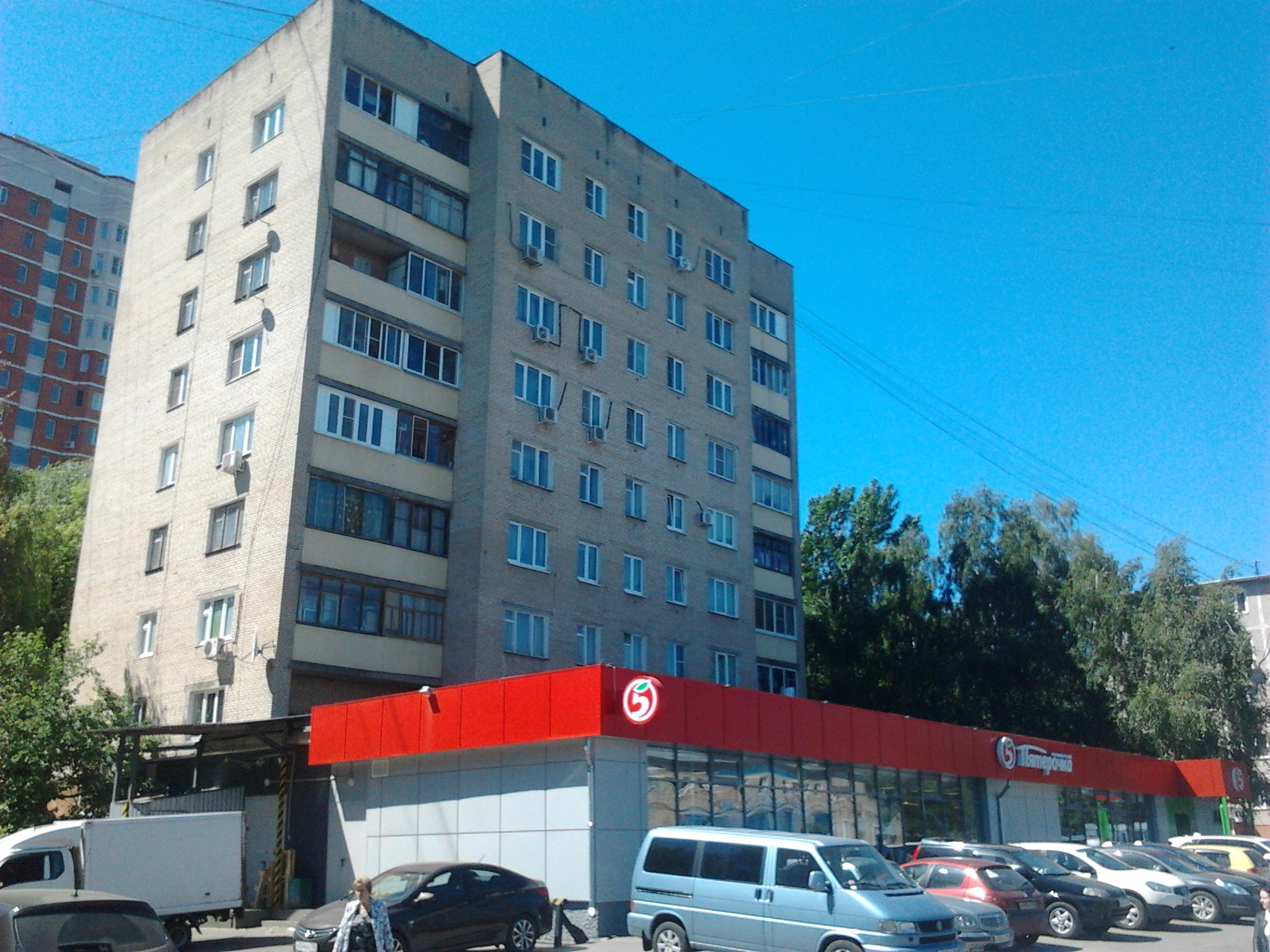 Дом, в котором жил Н. Т. Краев